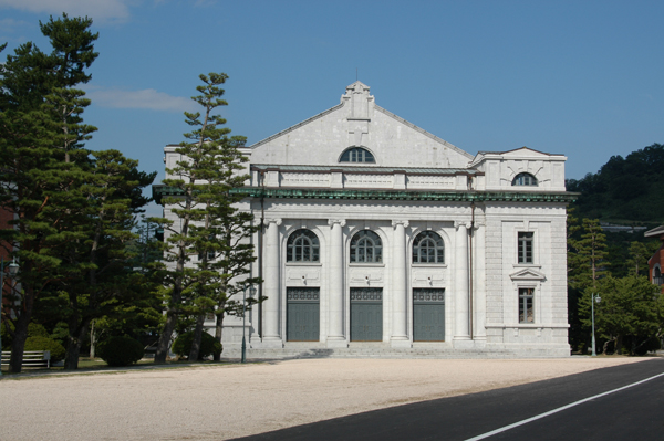 海上自衛隊第1術科学校大講堂